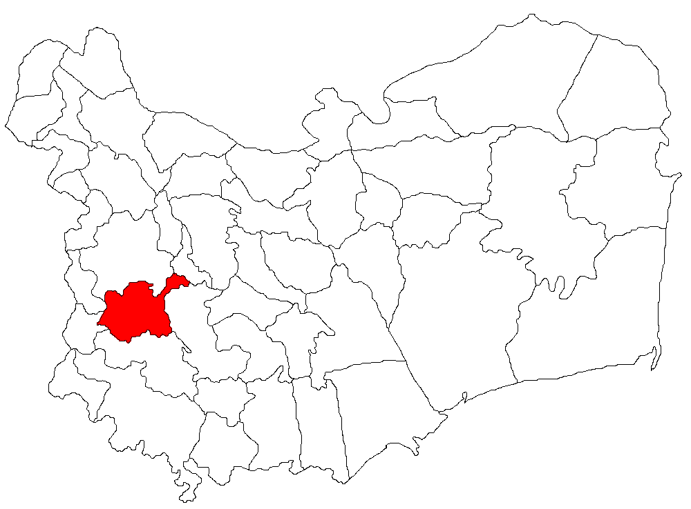 Categorie:Hărţi ale judeţului Tulcea